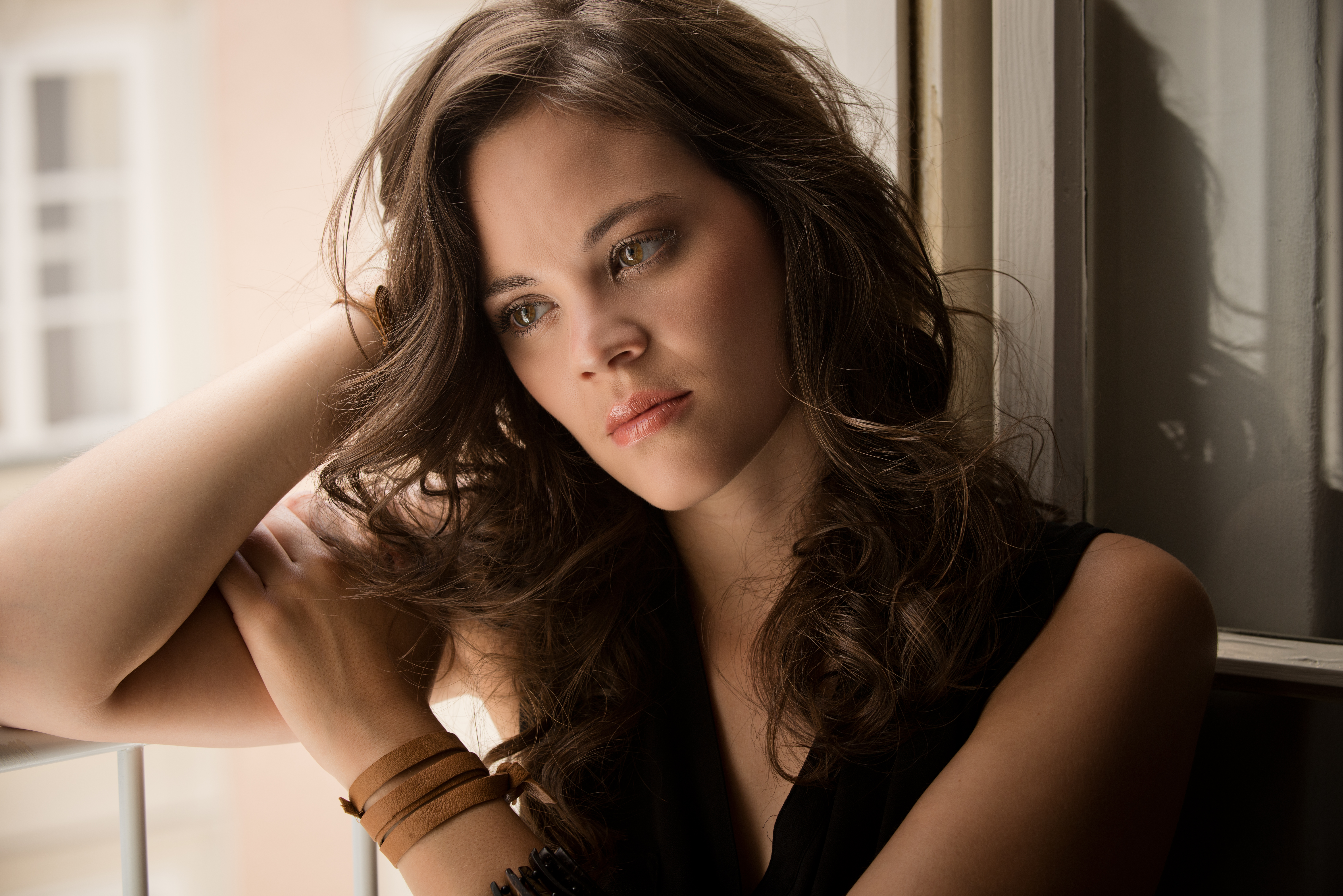 Regula Muehlemann